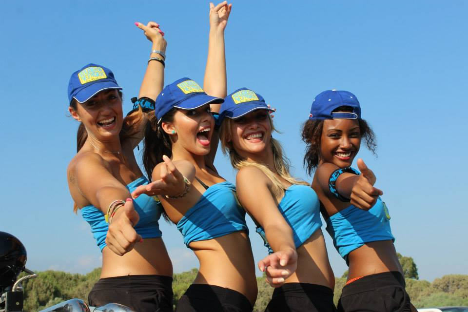 le Studio 54 Angels, le front girl di Radio Studio 54 Network